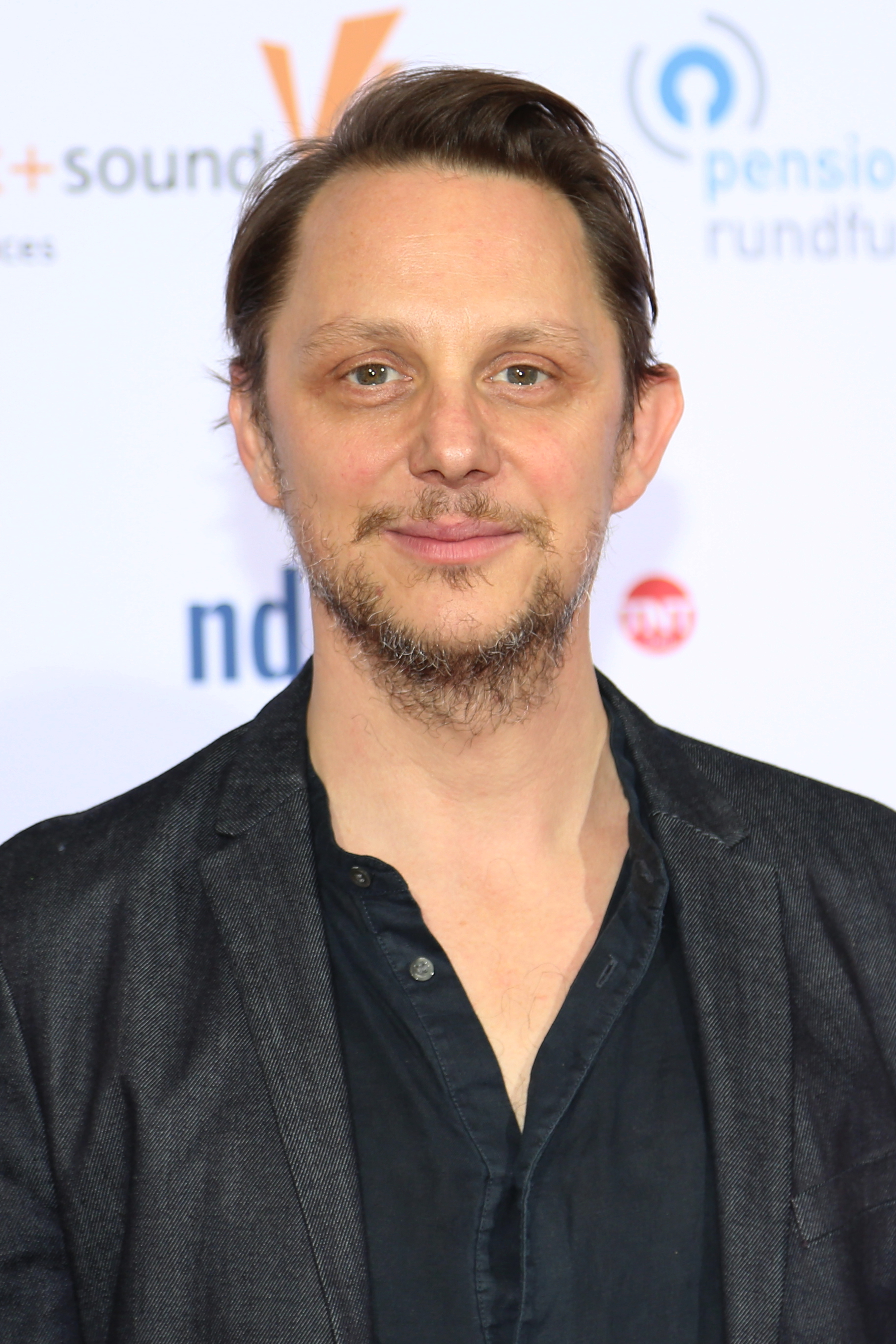 Arndt Schwering-Sohnrey bei der Verleihung der Auszeichnungen der Deutschen Akademie für Fernsehen (DAFF) 2017.